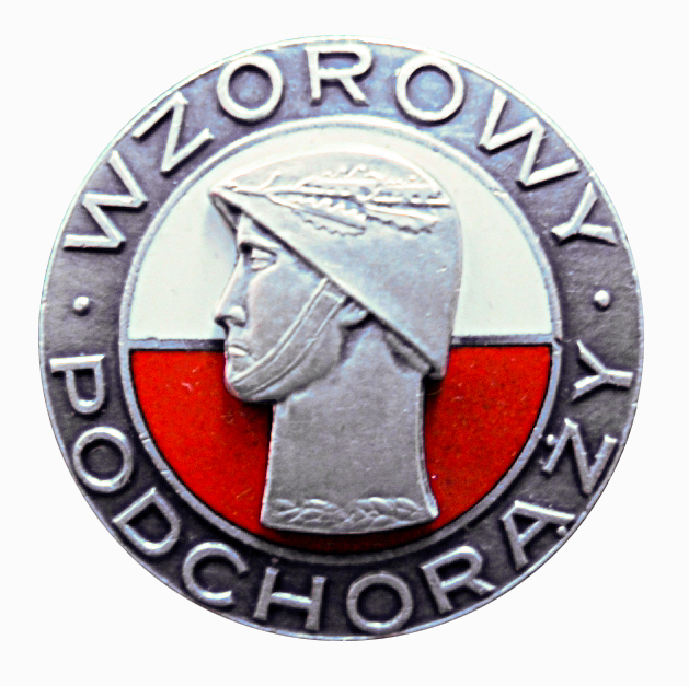 Wzorowy Podchorąży